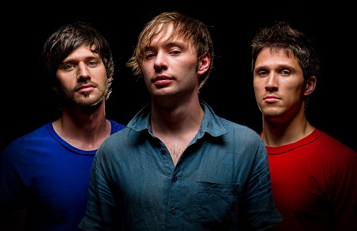 Фотосессия группы "Predict". Изображение взято с личного разрешения автора.